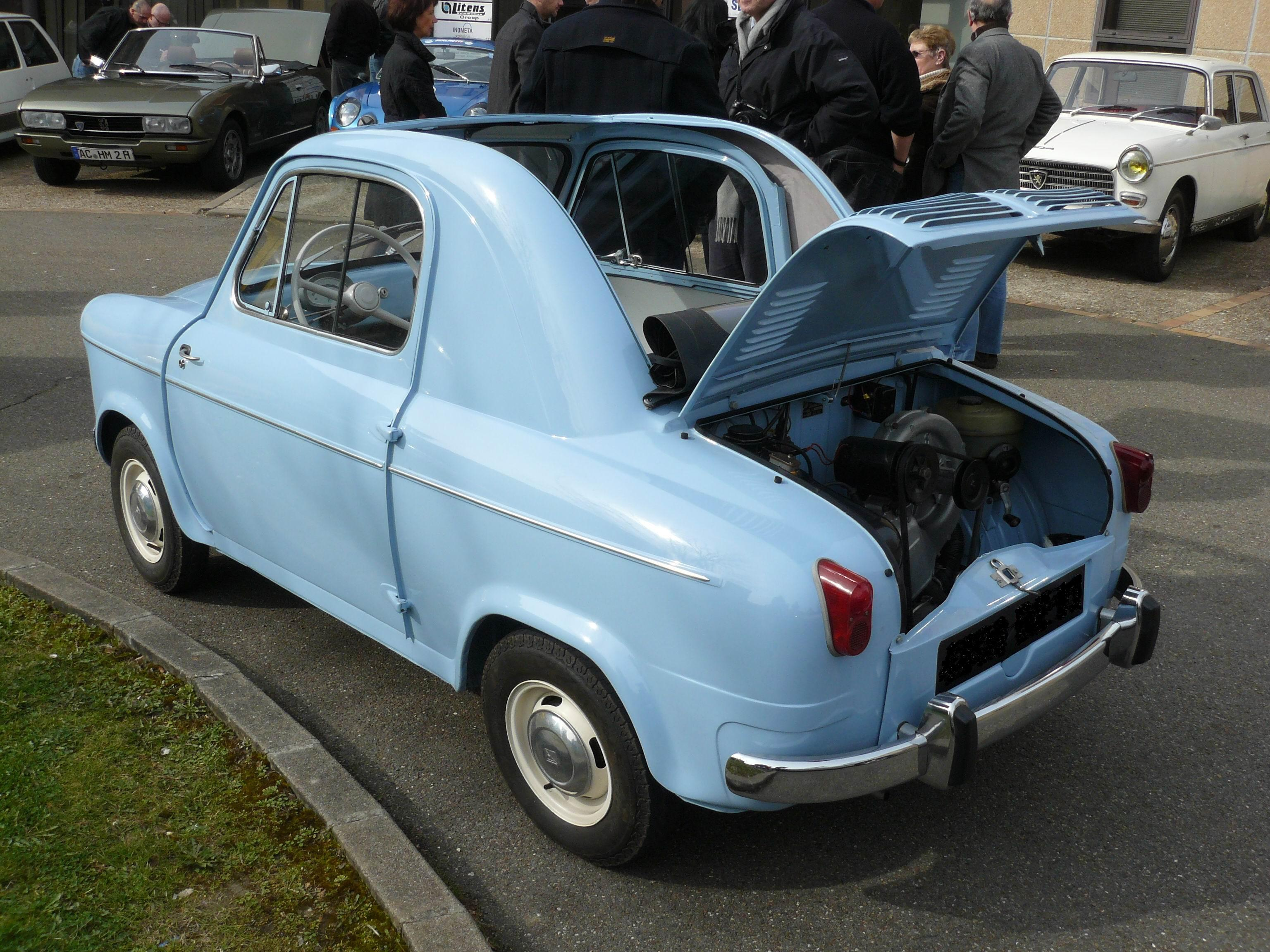 Bailly Mars 2011